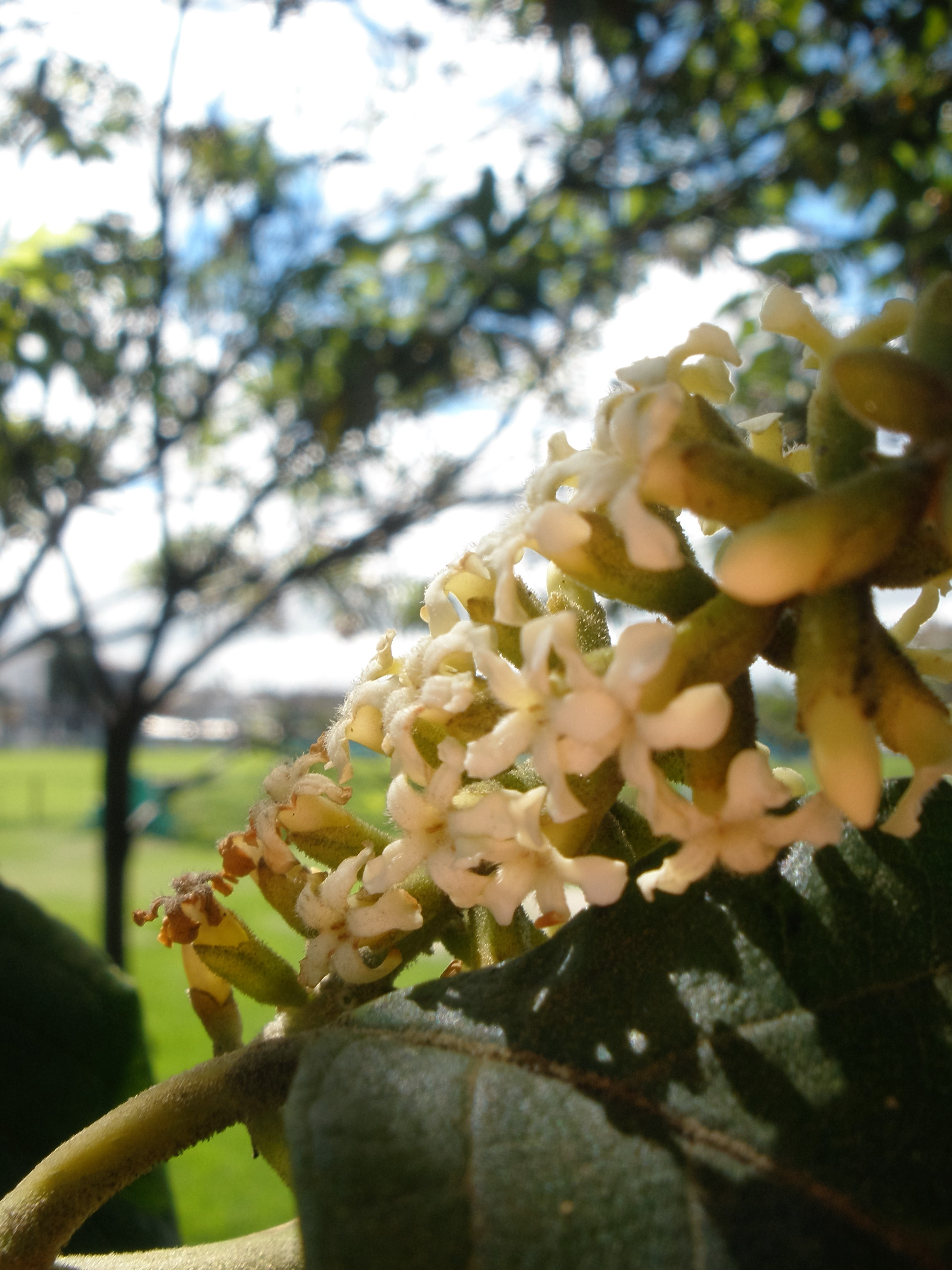 Inflorescencia de Citharexylum subflavescens